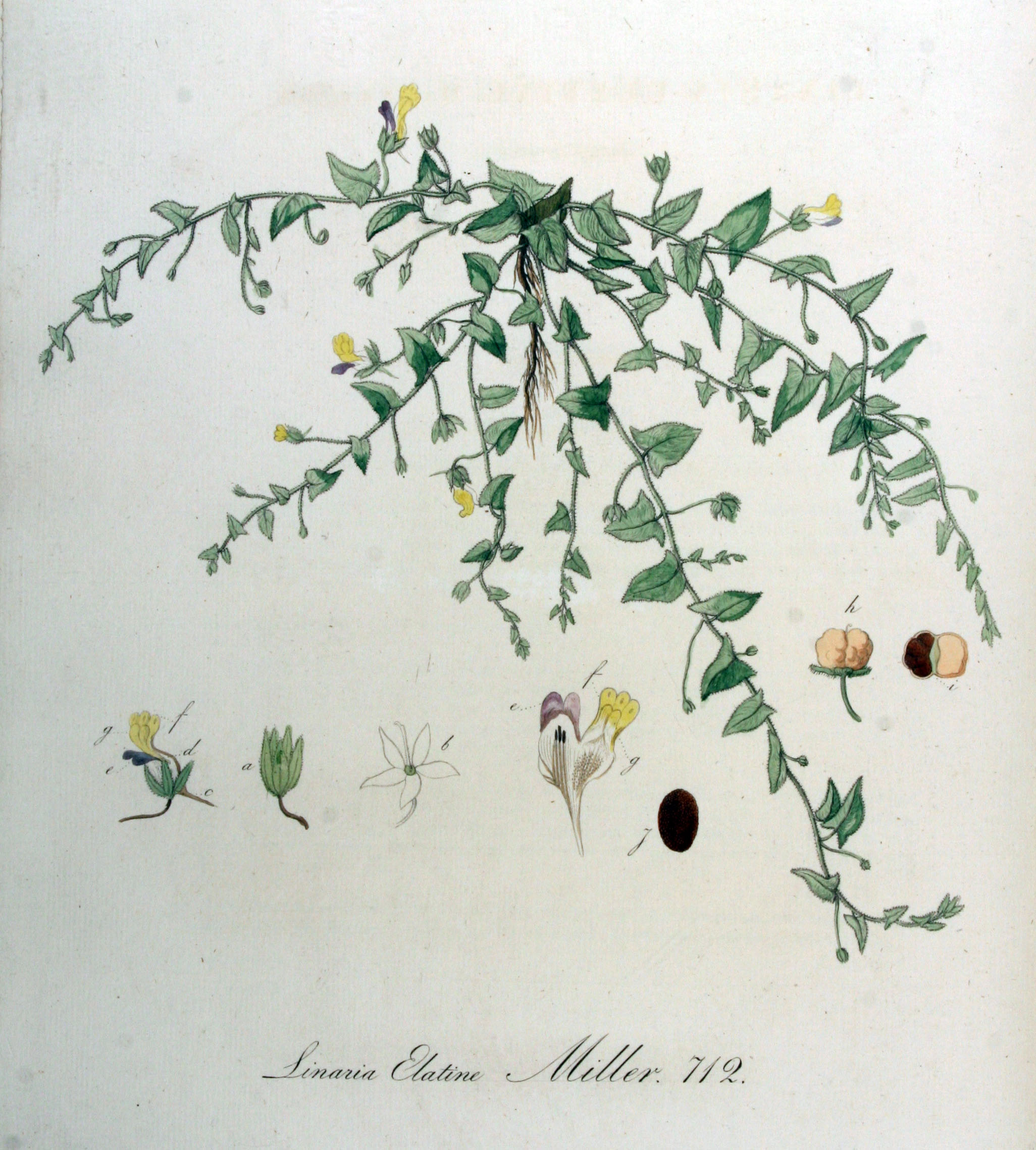 Kickxia elatine (L.) Dum. (Syn. Linaria elatine (L.) Mill.)